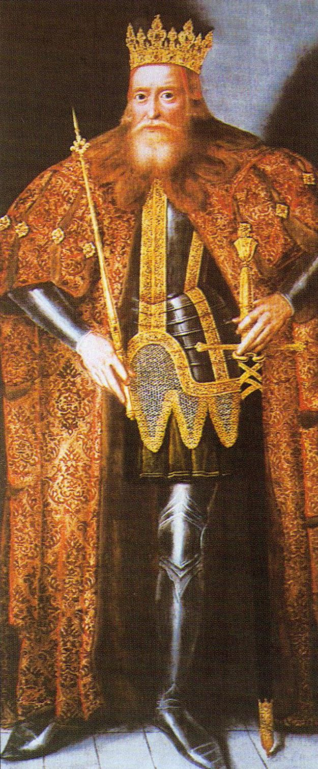 Wacław II